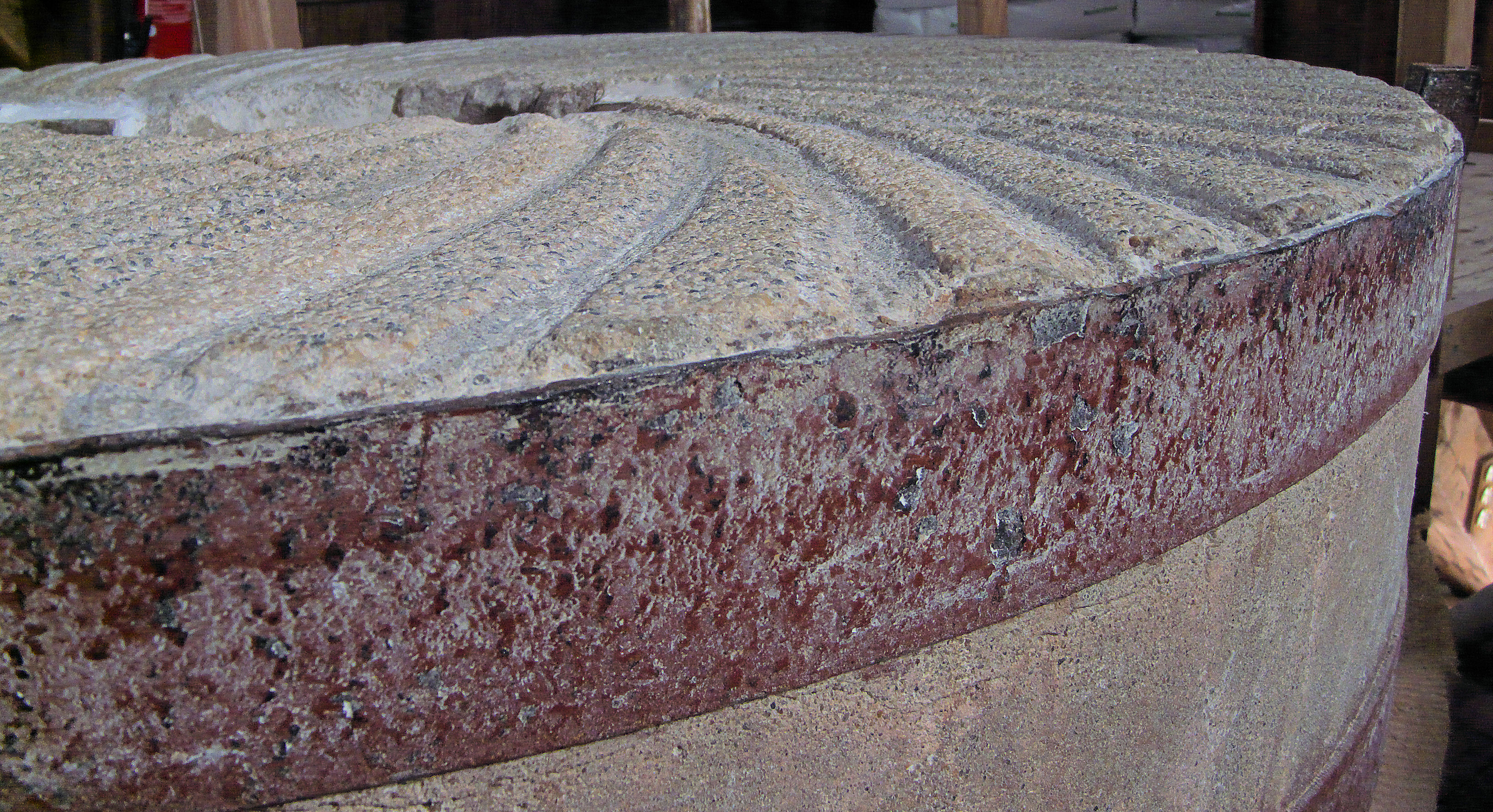 Closeup van loper van de Walderveense molen